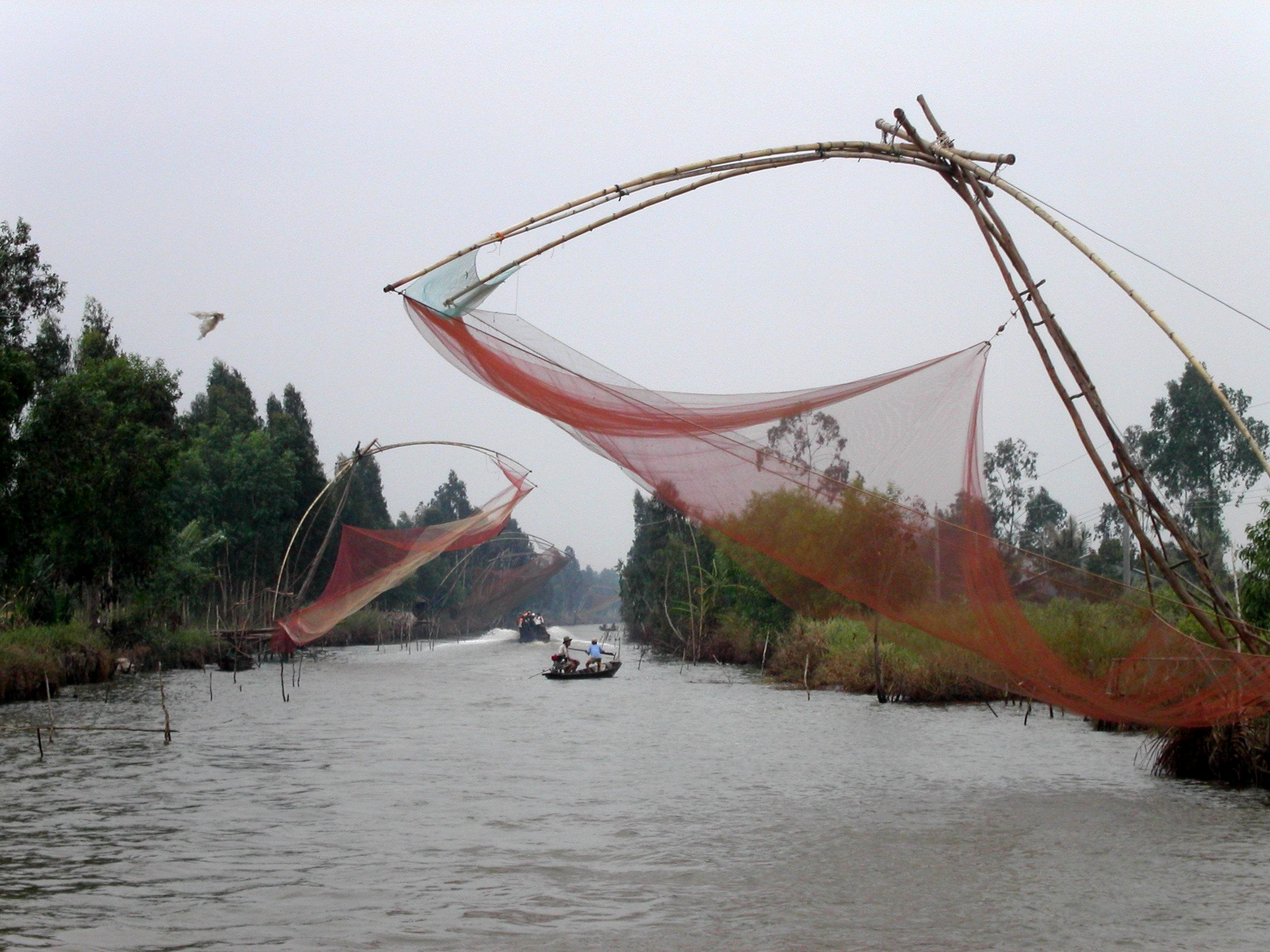 Fishing in Cà Mau, Vietnam.